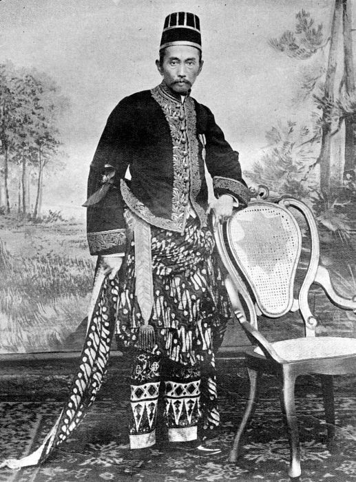 Repronegatief. Raden Adipati Soeria Nata Ningrat, regent van Lebak (West-Java), in inheems kostuum.